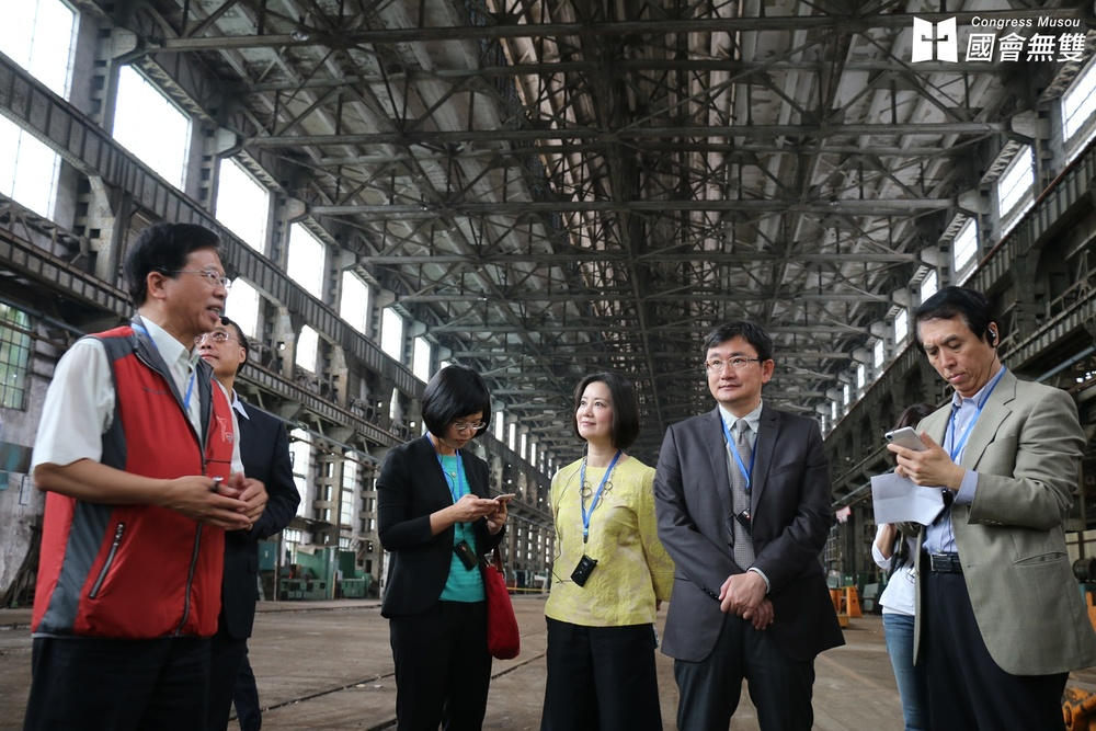 中文（台灣）: 民進黨籍教育文化委員會召委黃國書（右二），安排委員會到「臺北機廠」考察。照片背景為日治時期興建的「組立工場」。右起為國民黨立委陳學聖，民進黨立委黃國書、吳思瑤、蘇巧慧。